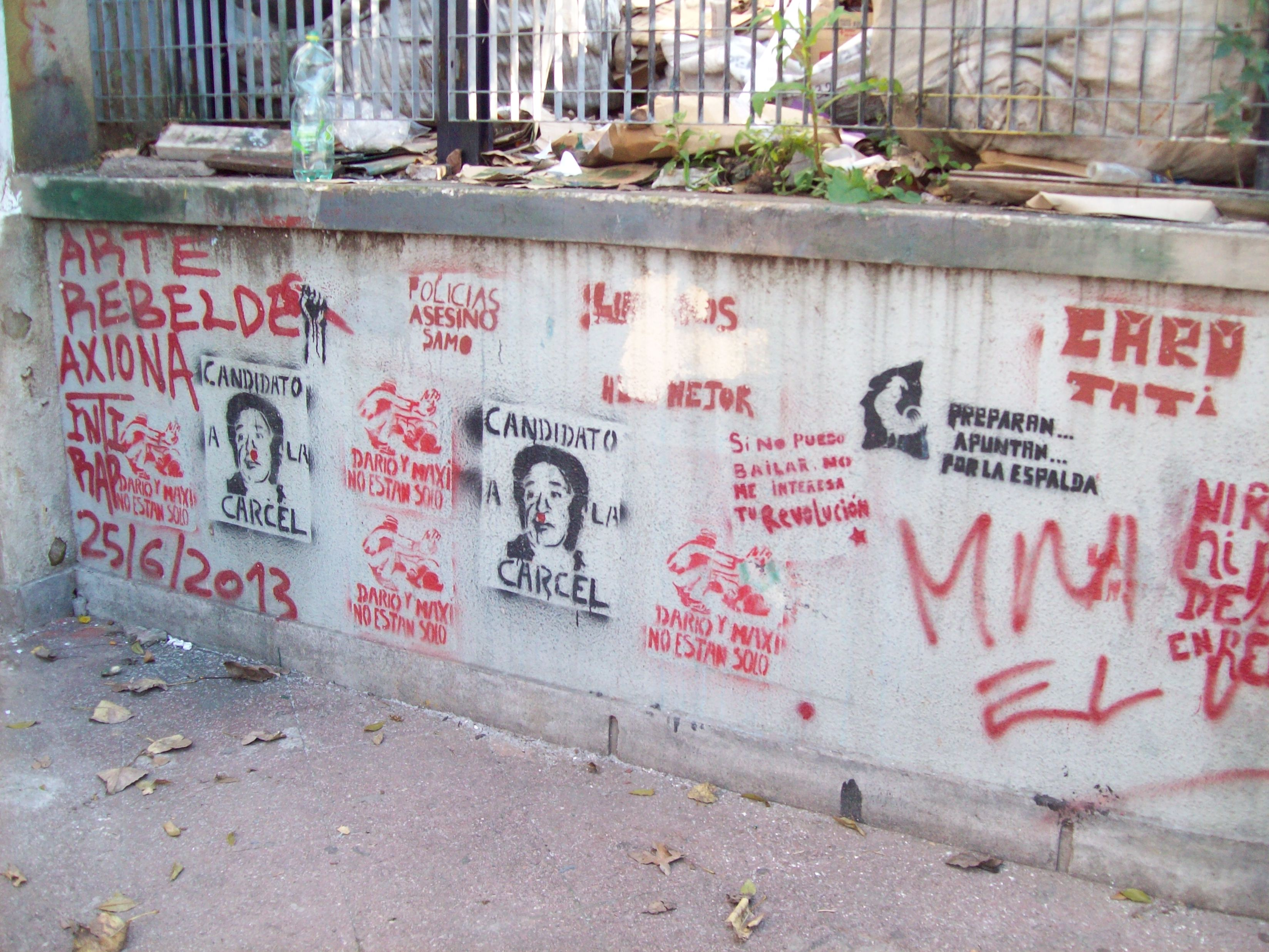 Estación Dario y Maxi, Avellaneda - Graffitis heterogéneos sobre la responsabilidad del gobierno de Duahlde en el asesinato de Dario y Maxi.